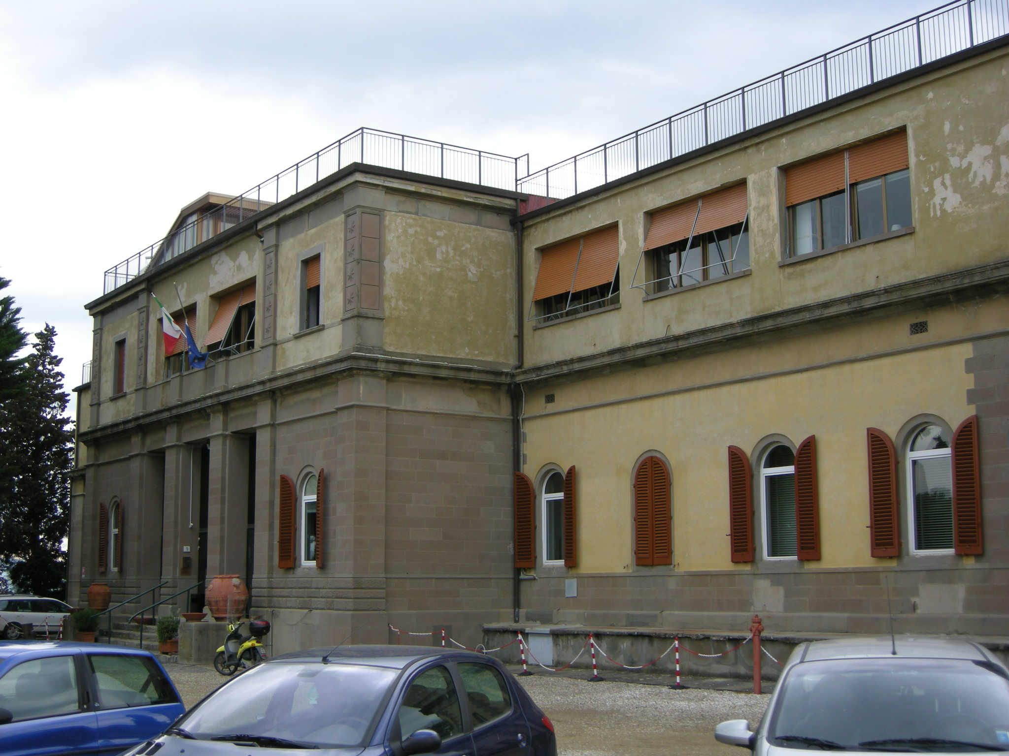 Osservatorio di arcetri, istituto